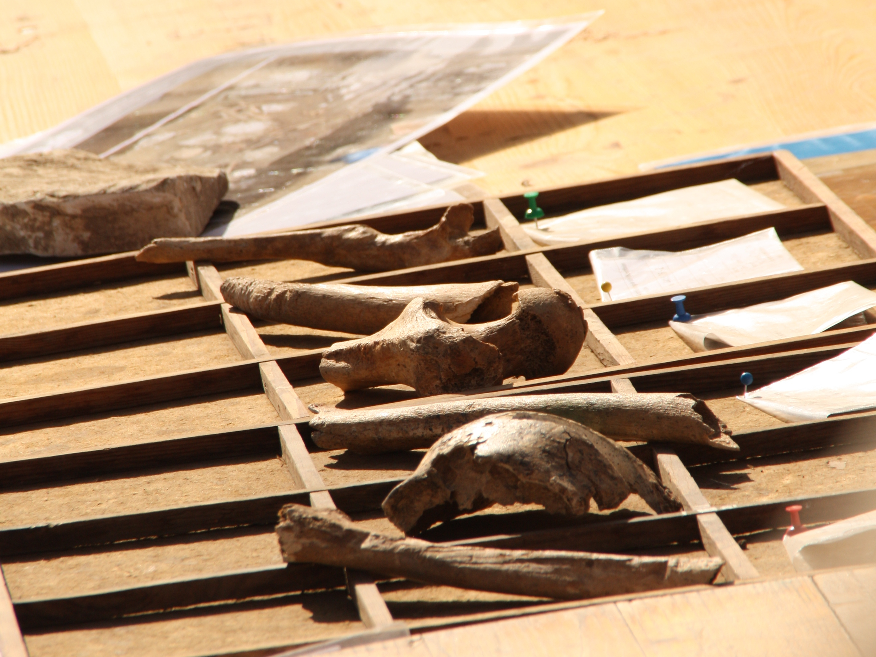 Grabungsort Schmerlecke. Die Expeditionsteilnehmer konnten sich Knockenstücke aus einem Jungsteinzeitgrab anschauen.